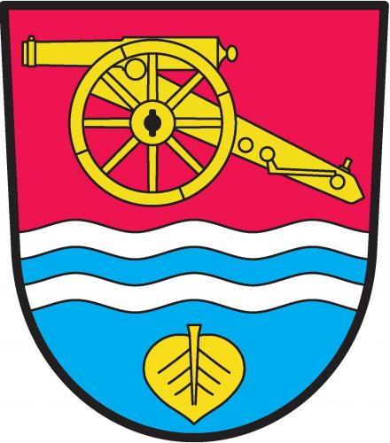 Benátky (HK), znak